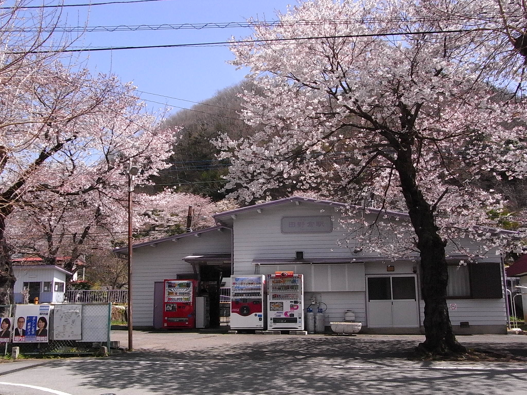 富士急 田野倉駅